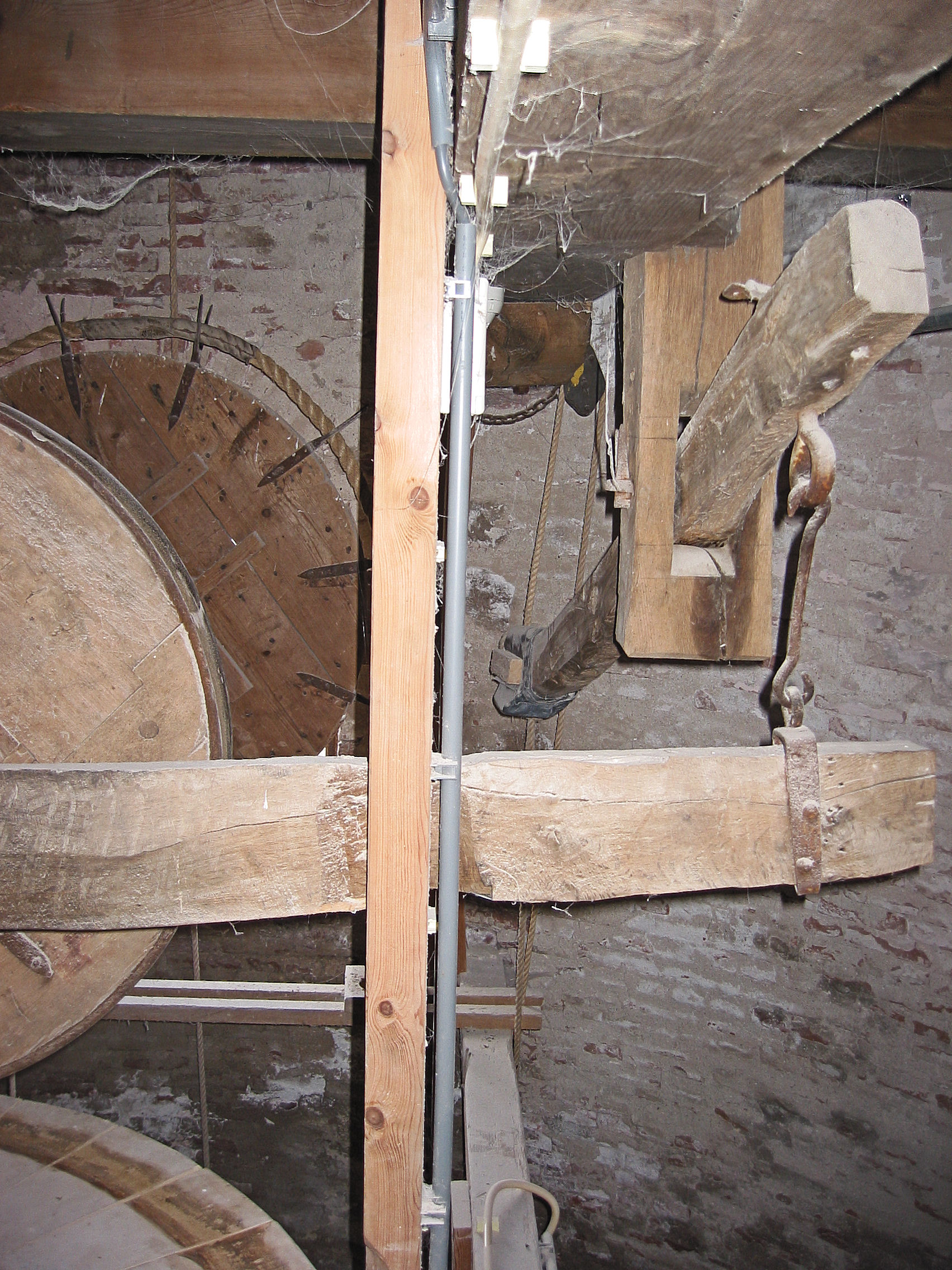 De Hoop in Garderen, Gelderland, the Netherlands